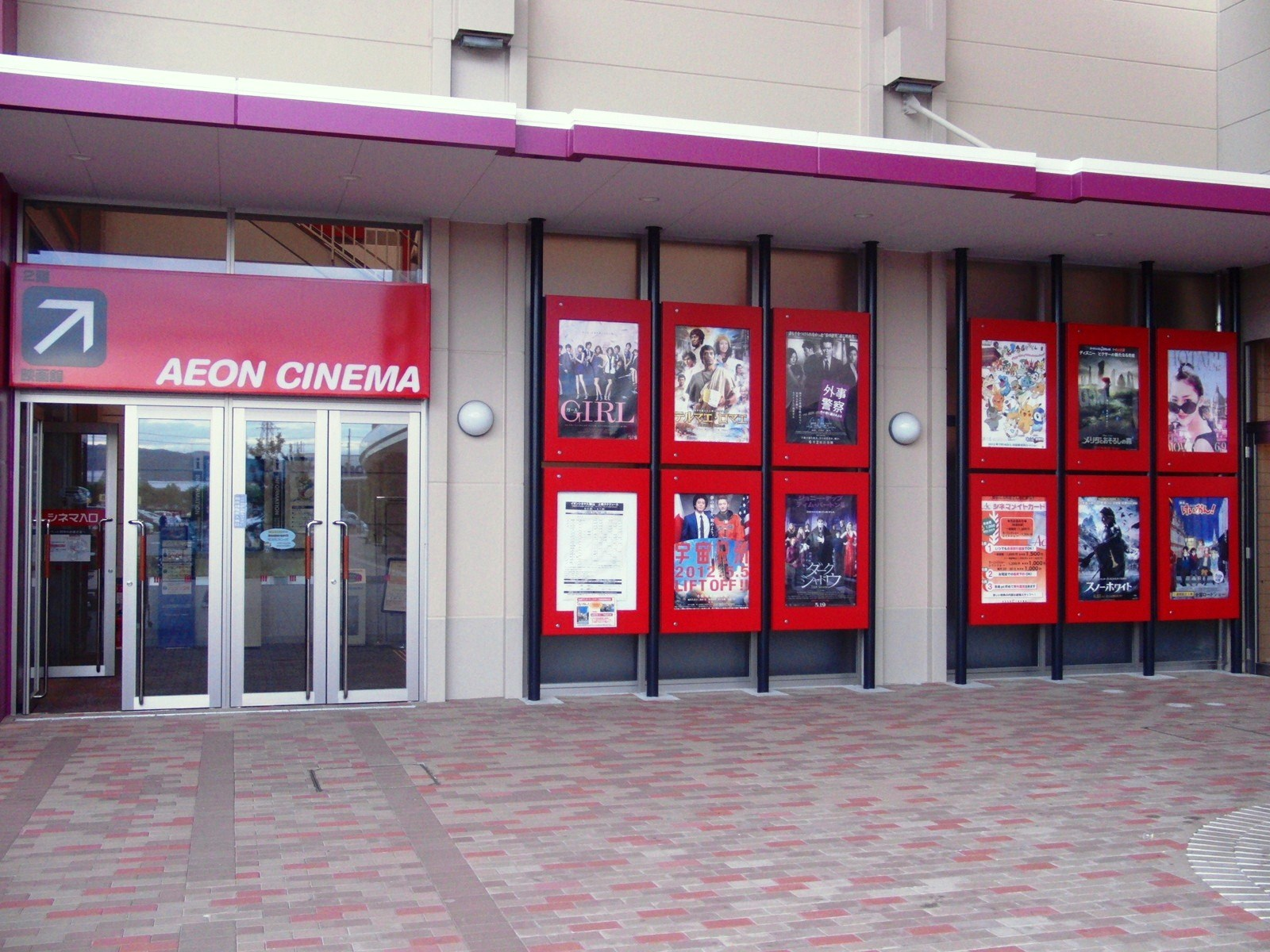 イオンシネマ久御山につながるゲートを撮影